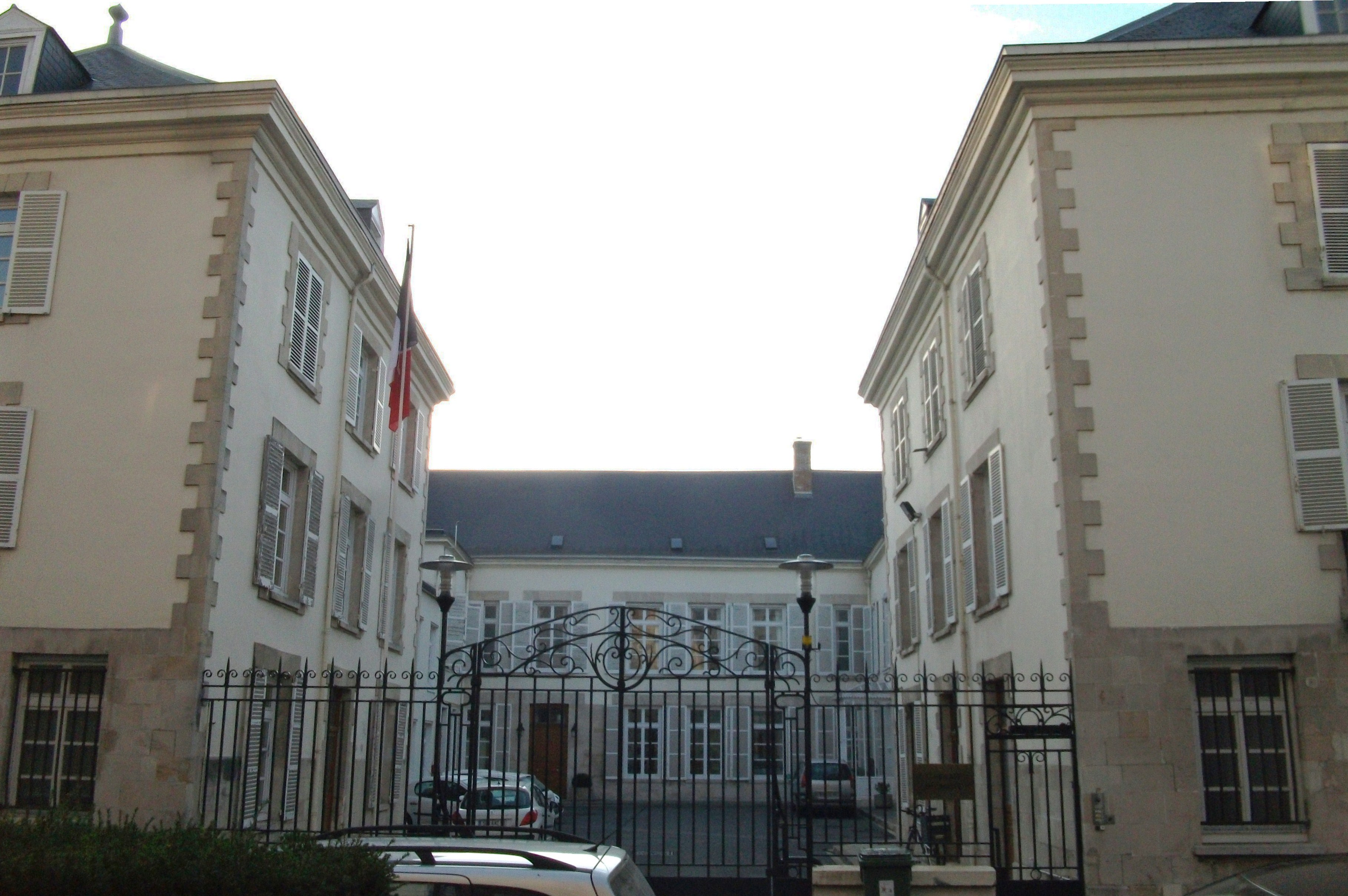 Siège de la première brigade mécanisée française rue Pasteur. C'est aussi le lieu ou est mort lé général Chanzy.